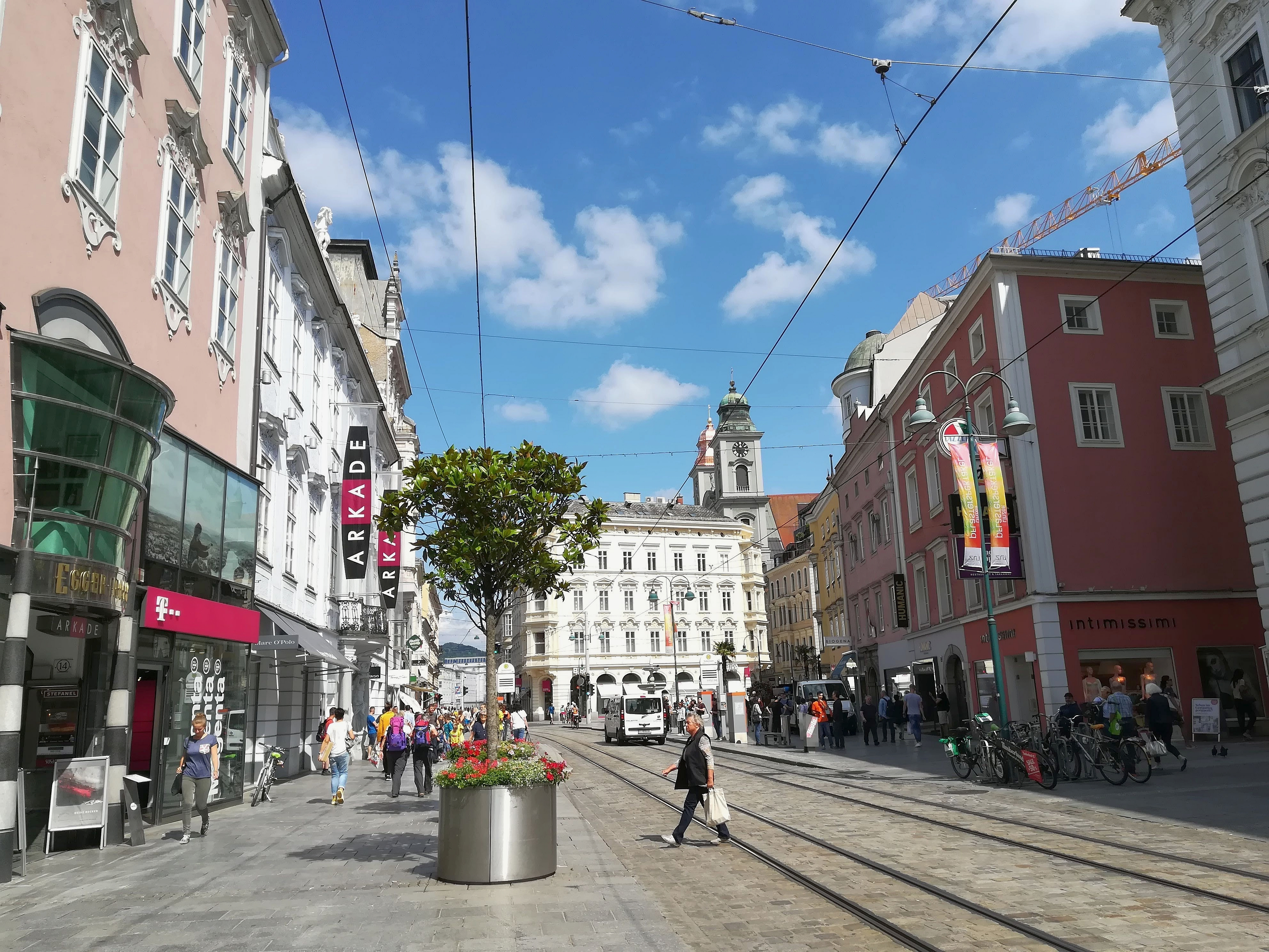 zentral: Taubenmarkt, von Süden aus gesehen (Blickrichtung Norden)